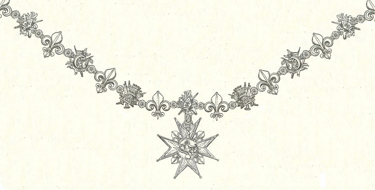 Orde van Sint-Januarius, Napels 1800 Ridder/knight